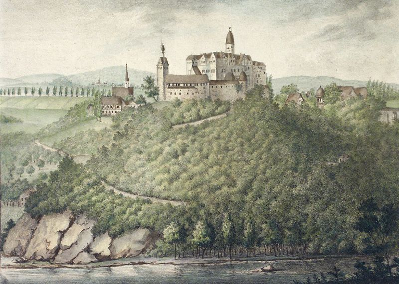 Thamisch: Rochsburg, c. 1830